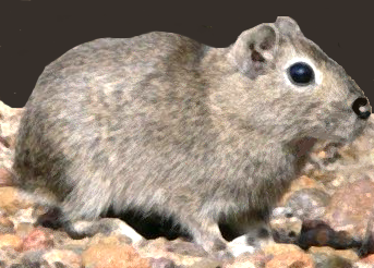 Cuis chico (Microcavia australis) - Foto composición digital 2006 Microcavia australis australis (Geoffroy and d’Orbigny, 1833), que habita en el extremo sur de la Argentina, desde San Juan hasta Santa Cruz.